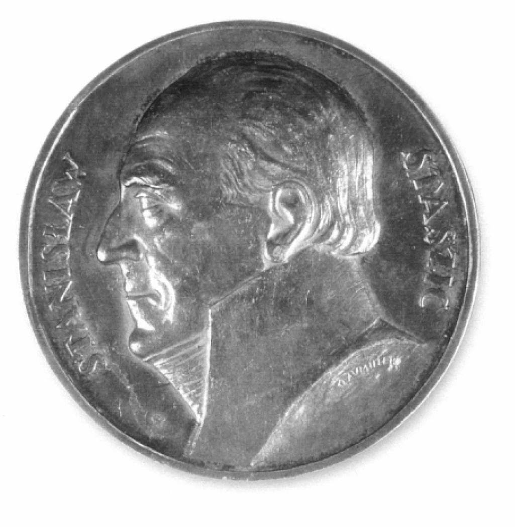 medal - setna rocznica śmierci Stanisława Staszica, 1926, autorstwa Józefa Aumillera, Aw: Popiersie w lewo i napis w otoku, 55 mm